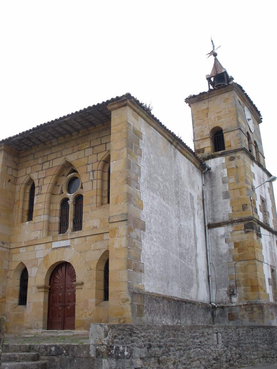 Ermita de Santa Ana (Cóbreces, Cantabria)